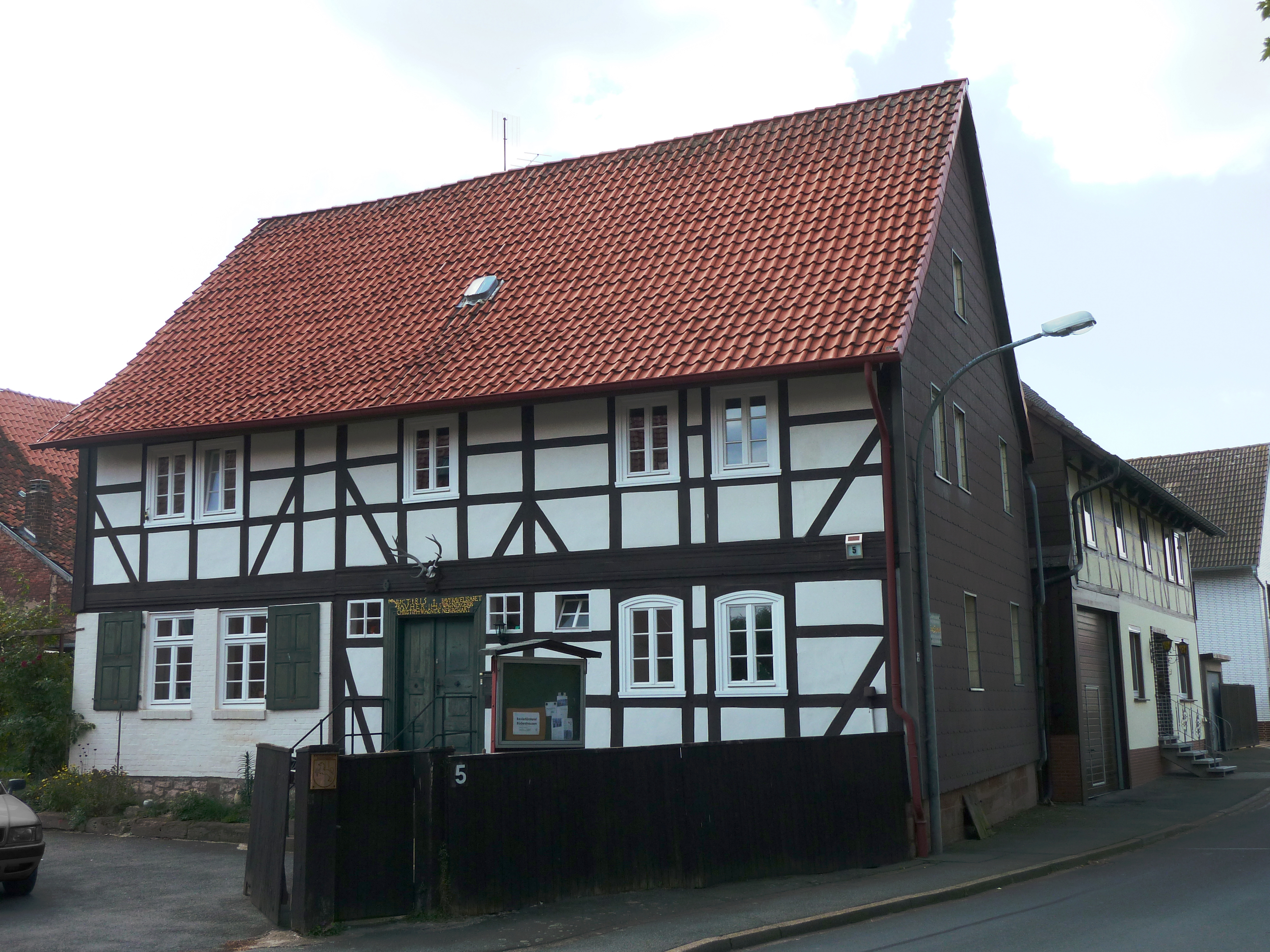 Revierförsterei in Rüdershausen, Untereichsfeld, Niedersachsen. Erbaut lt. Inschrift über der Haustür 1815 von Christoph und Elisabeth Wagner (die Denkmaltopographie gibt abweichend an: 1805)